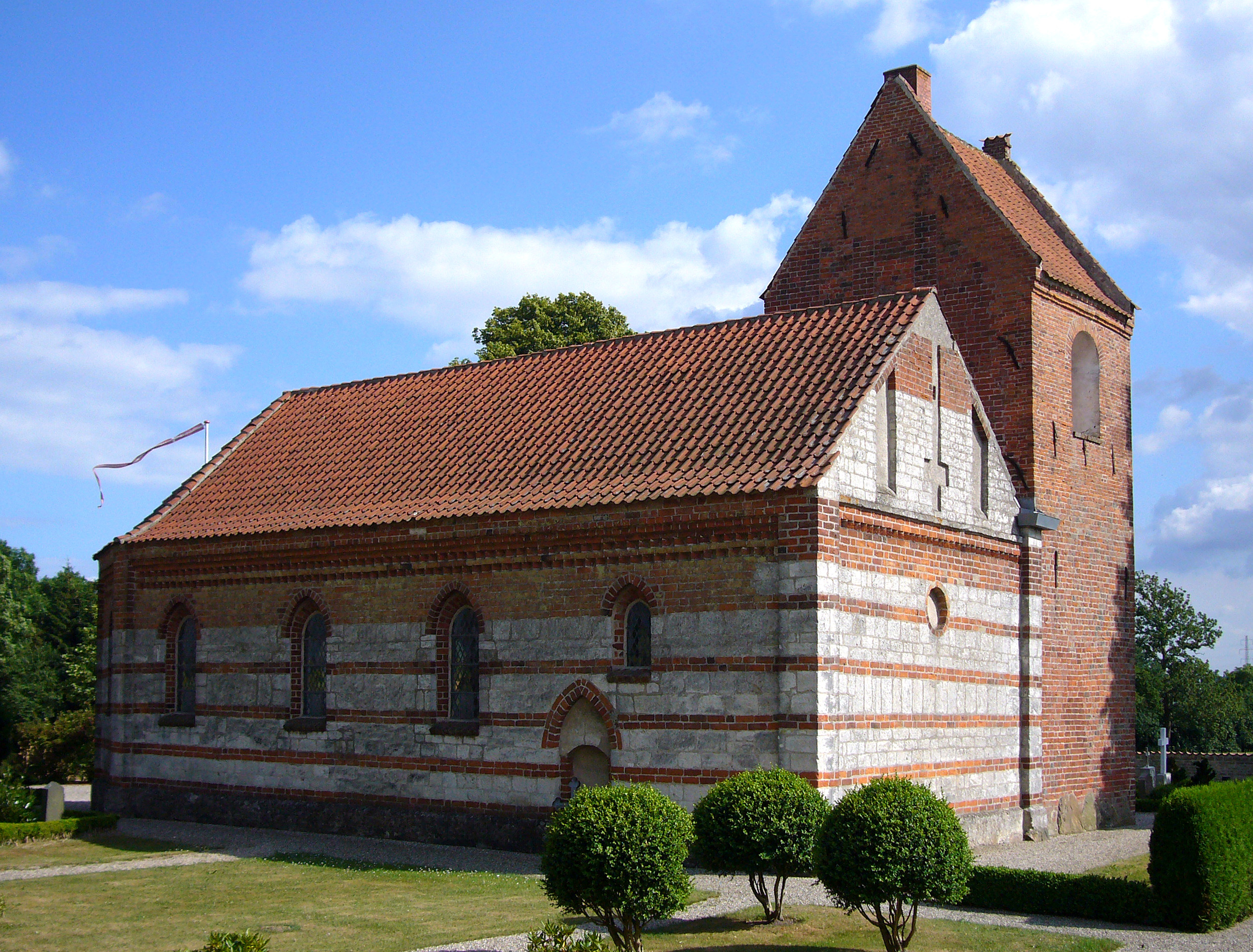 Kirke Skensved Kirke, Roskilde County, Denmark. Rear view